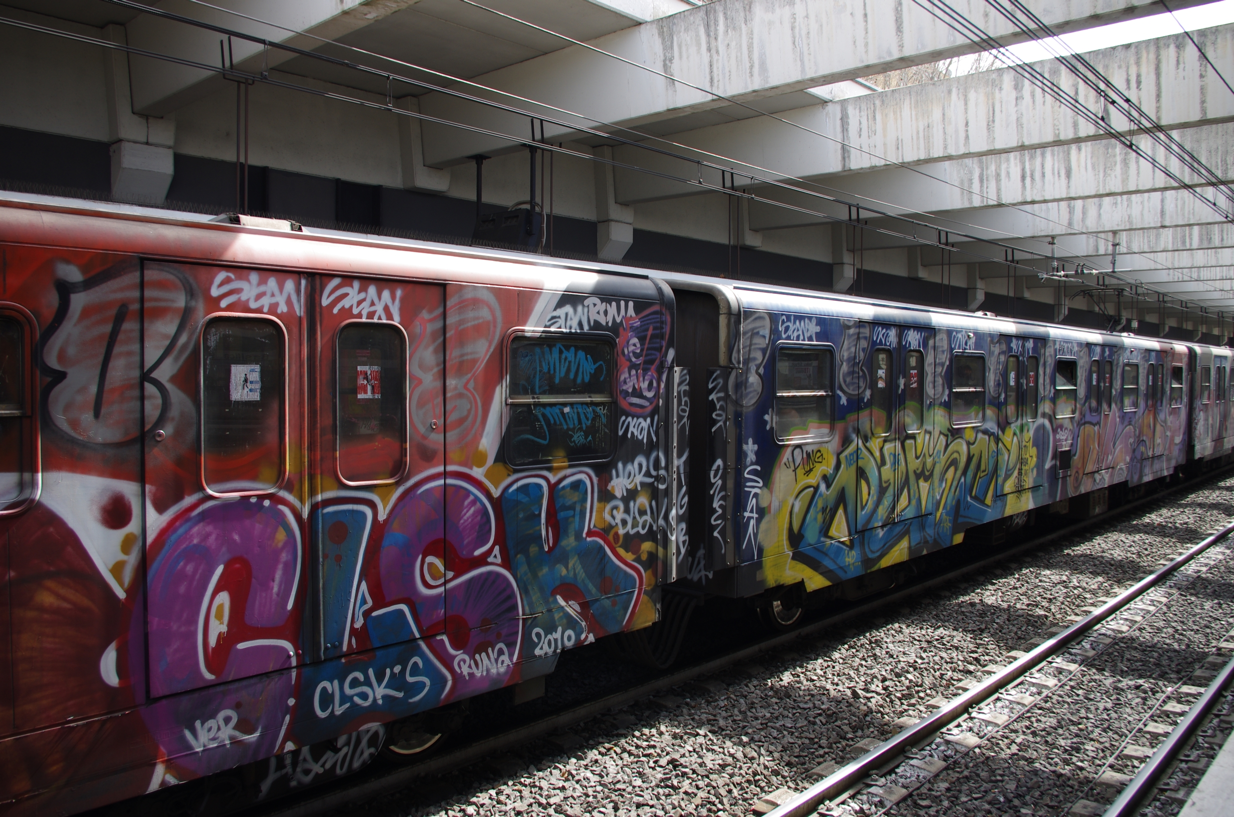 Rom in Italien. Ein U-Bahnzug in der Station Basiklika St. Paolo in Rom. Der Zug ist komplett mit Graffiti versehen.